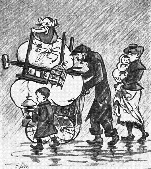 Drawing „Trockenwohner“